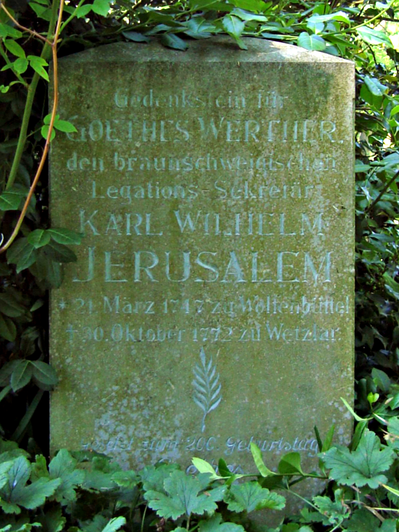 Gedenkstein für Karl Wilhelm Jerusalem in Wetzlar, selbst fotographiert